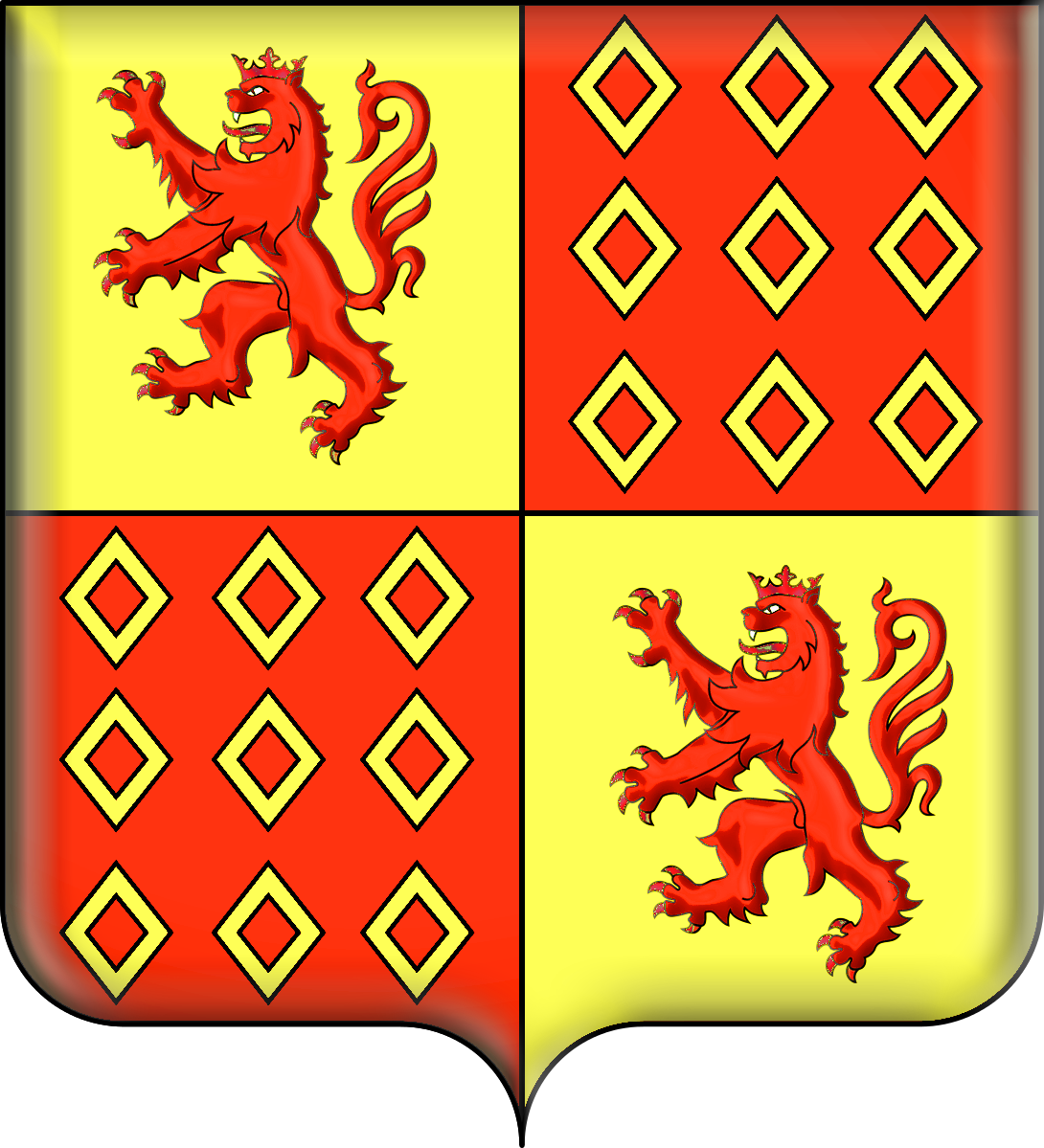 Armes de Louis-Charles d'Albert, 2e duc de Luynes